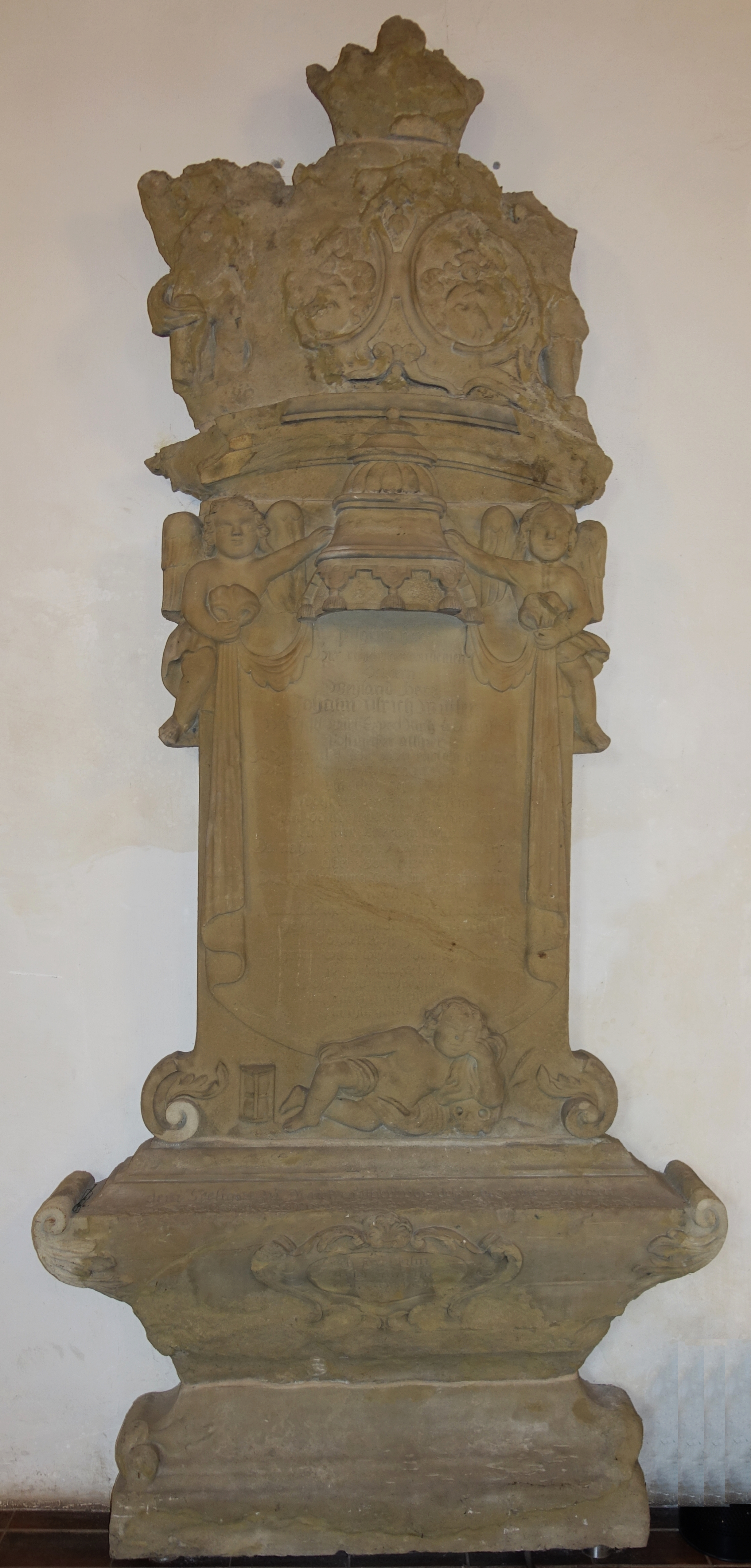 Epitaph an der Südwand in der Uffkirche auf dem Uff-Kirchhof in Stuttgart-Bad Cannstatt für den Cannstatter Expeditionsrat und Reichspostmeister Johann Ulrich Mittler (1679–1743).